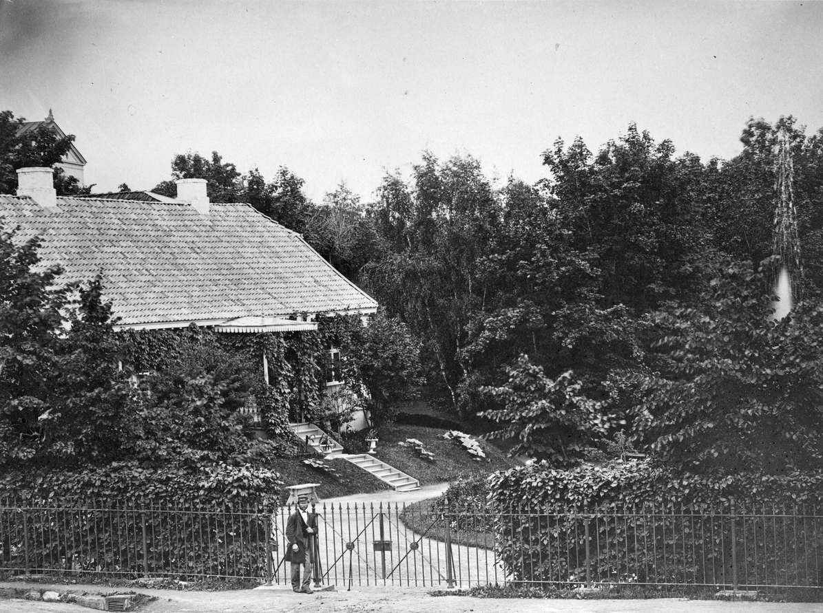 Nedre Skillebekk løkke, Munkedamsveien 96. Senere revet, og tomten ble lagt ut til oppføring av bygårder, så som dagens Munkedamsveien 96 og 98 samt flere adresser i Framnesveien og Niels Juels gate. Foto: Per Adolf Thorén, 1870. Fra Byhistorisk samling hos Oslo Museum.